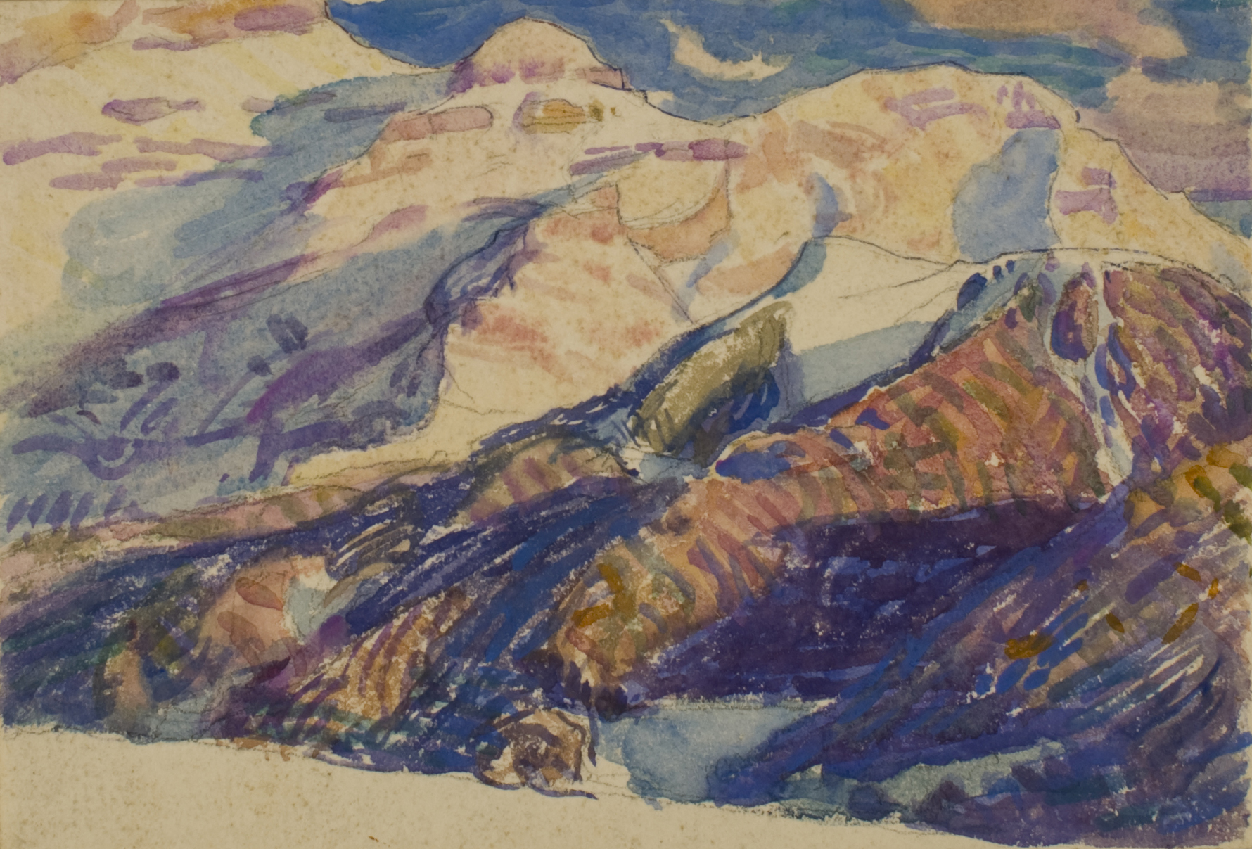 Abraham Hermanjat, Montagnes enneigées, sans date, mine de plomb, aquarelle et gouache sur papier, 12,4 x 18,2 cm. Nyon, Fondation Abraham Hermanjat.